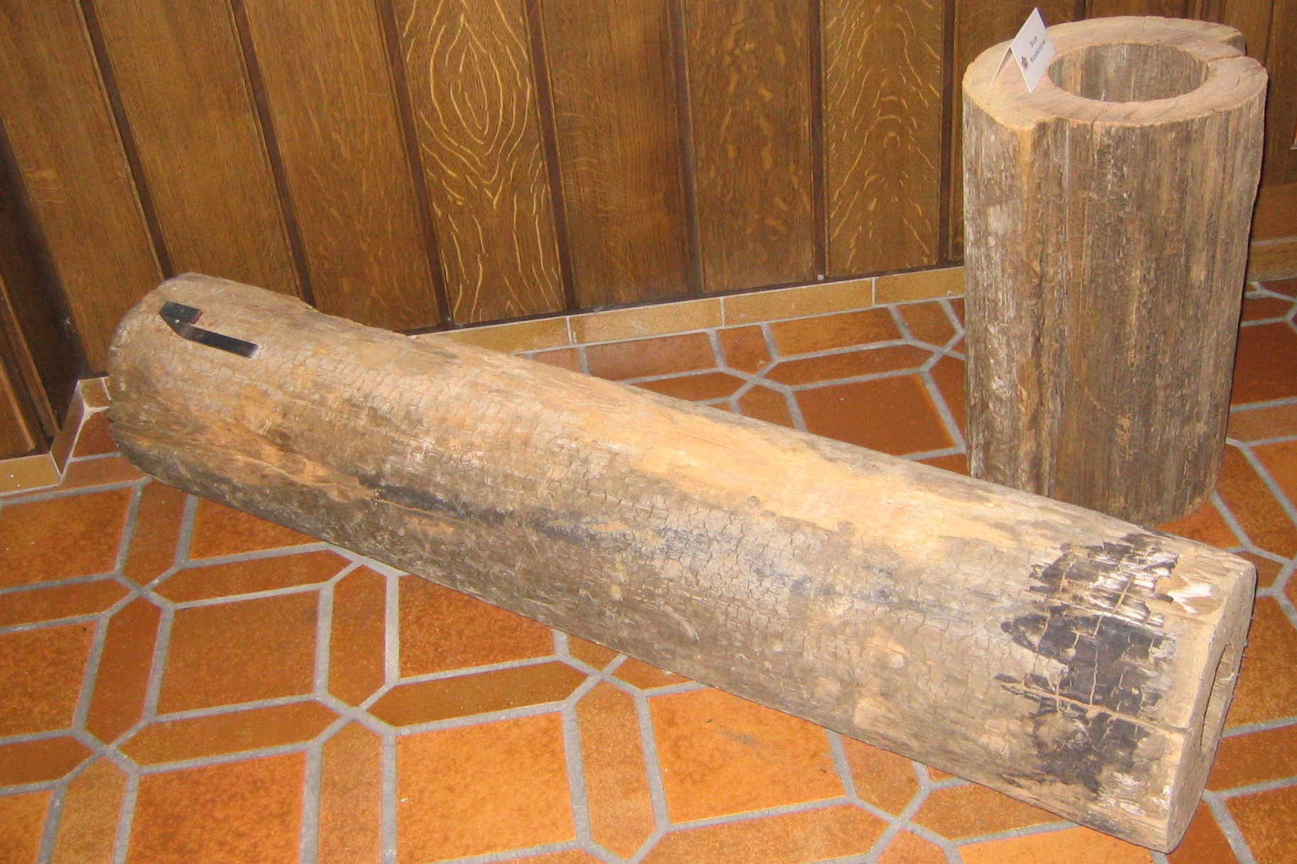 aufgenommen während einer Brauerei Besichtigung bei Fürstenberg in Donaueschingen